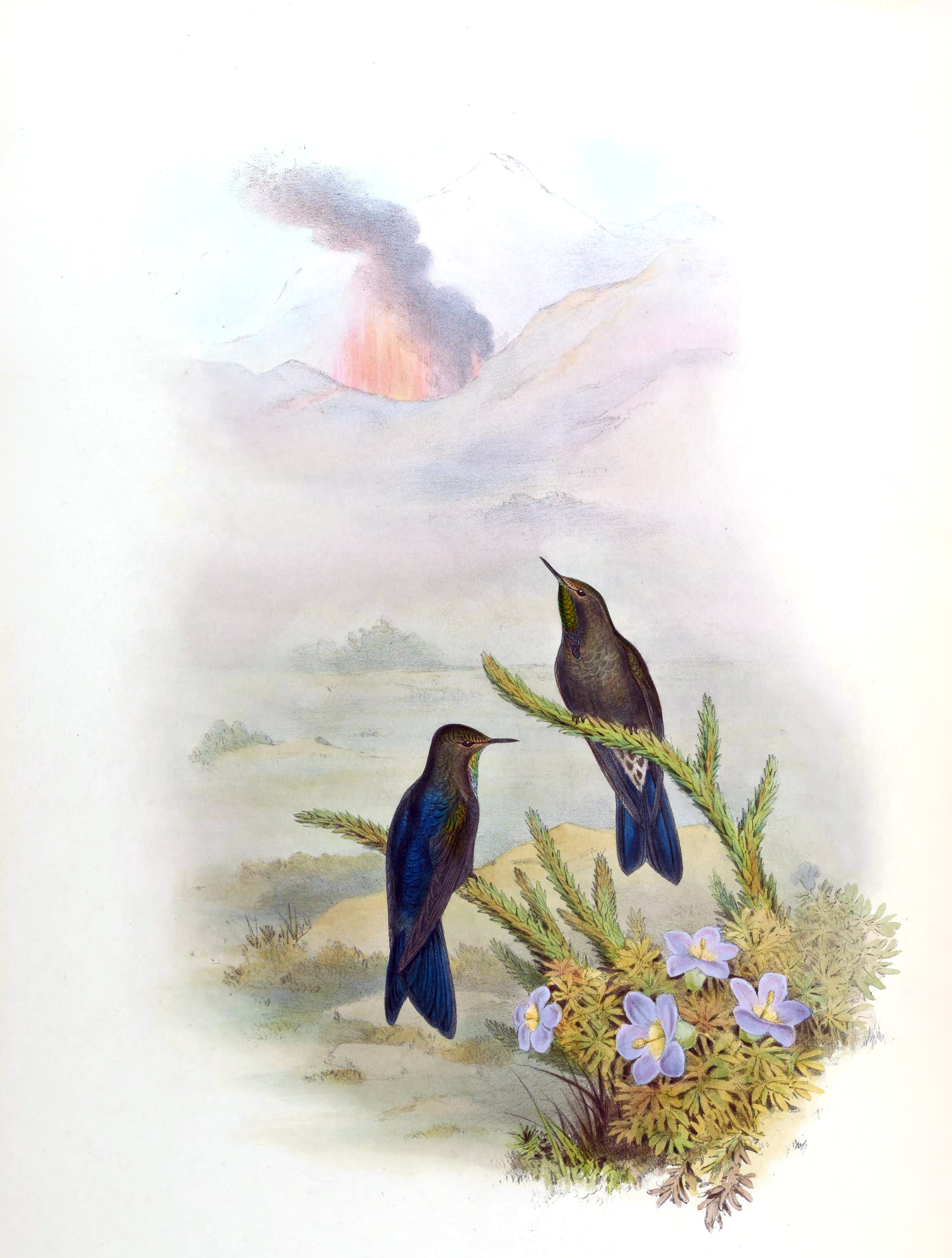 Ramphomicron vulcani = Chalcostigma stanleyi vulcani [1]